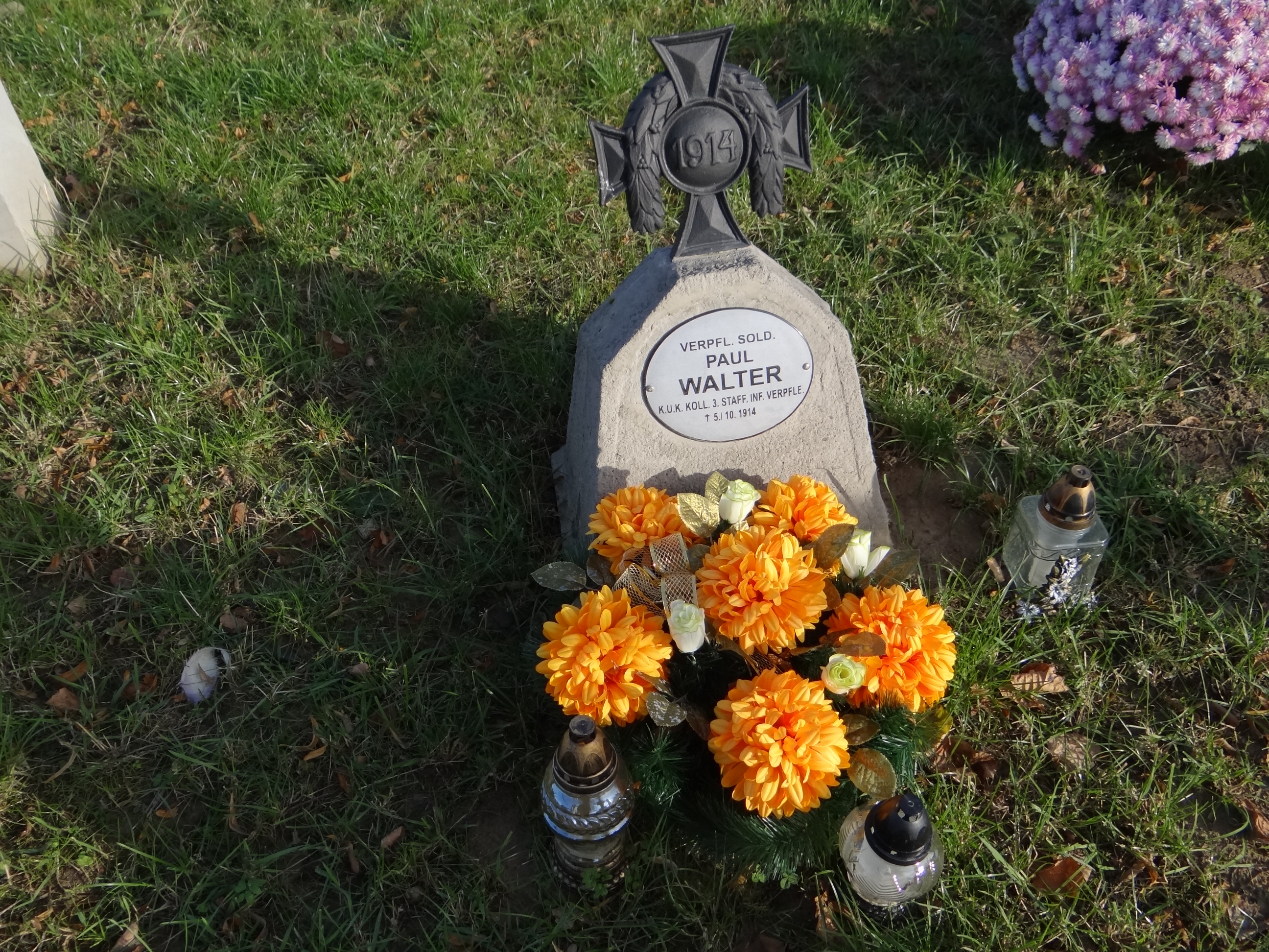 Cmentarz wojenny nr 353 - Tęgoborze